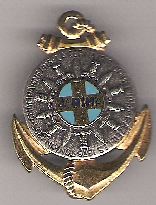 Insigne régimentaire du 4e régiment d'infanterie de marine.